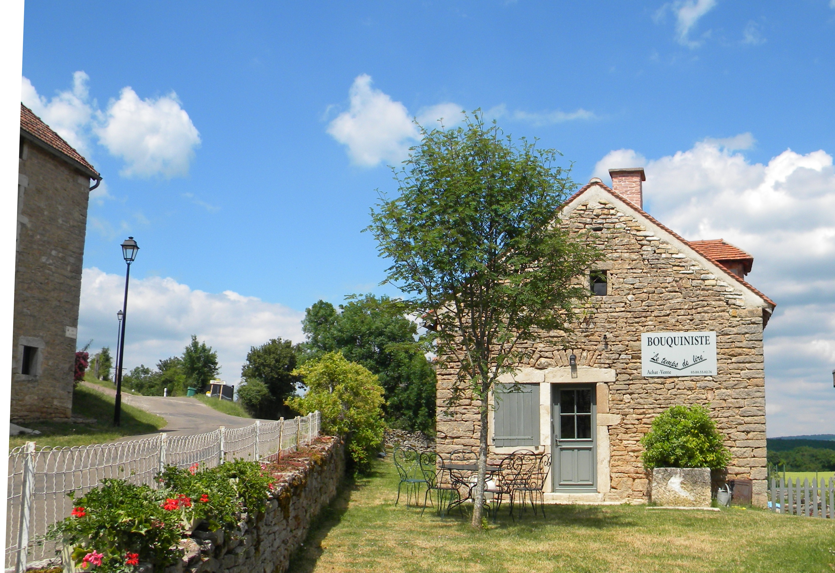 Librobutiko